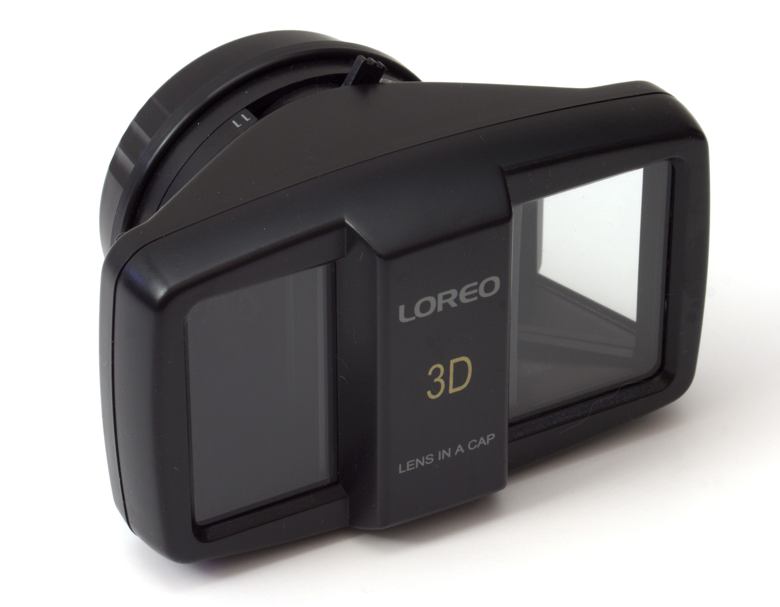 Loreo stereoscopic lens attachment (for Canon digital SLR).